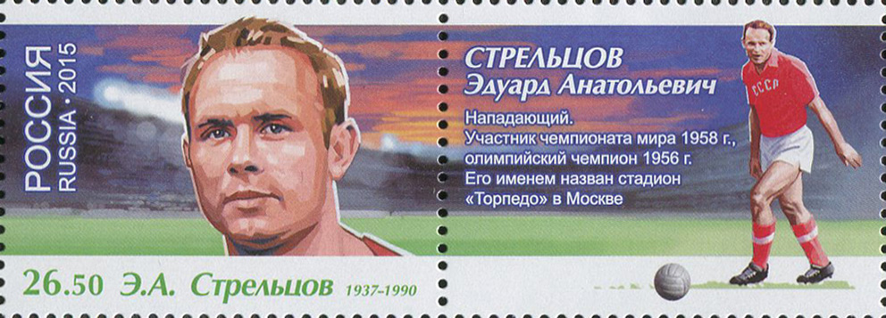 Чемпионат мира по футболу FIFA 2018 в России. Легенды футбола.Э.А. Стрельцов (1937-1990)